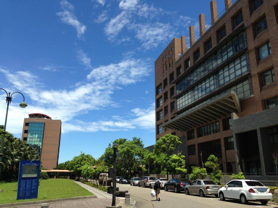 中國科技大學新竹校區啟我大樓，圖片內左側建物為安以軒（女生二宿）、右側為啟我大樓正門。